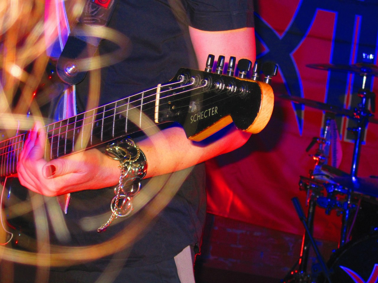 Концерт Глеба Самойлова и проекта Матрикс в баре Мажор. Калуга, 2014.